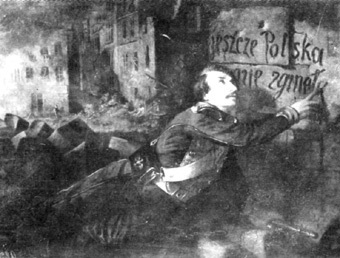 Umierający żołnierz wolności (Expiring soldier of liberty)